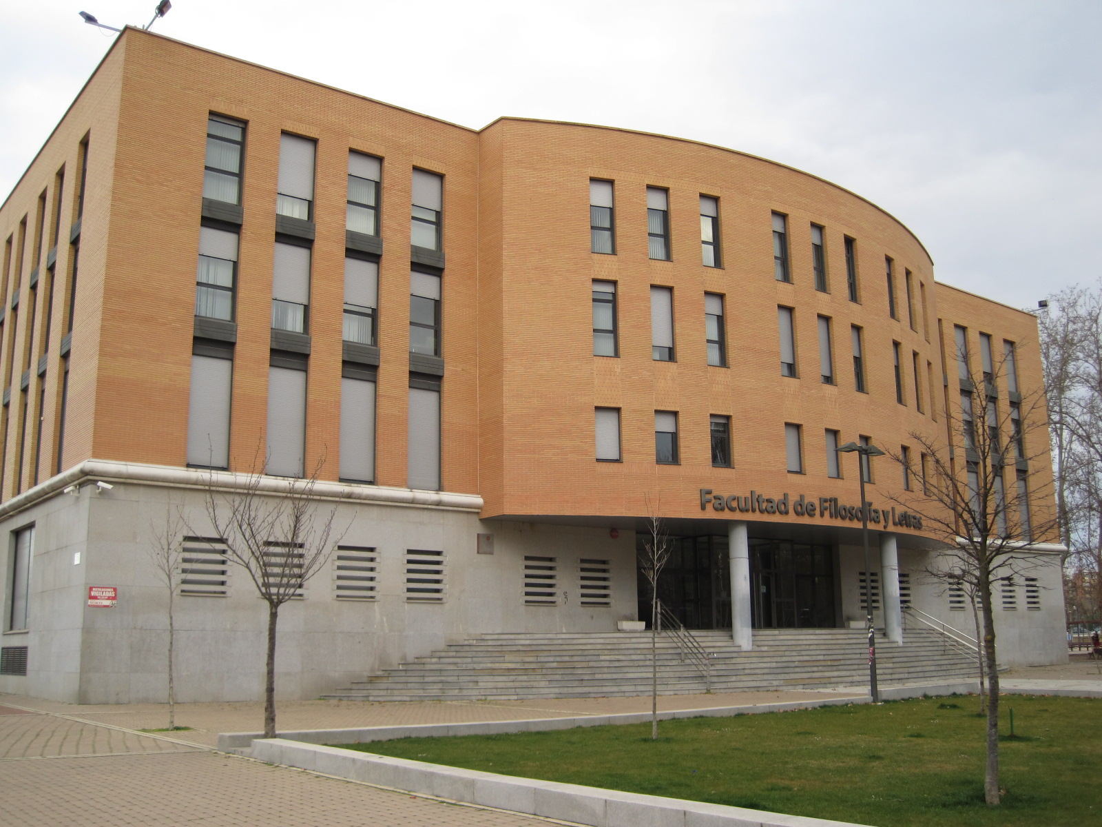 Fachada de la facultad de Filosofía y Letras, en Valladolid (España).